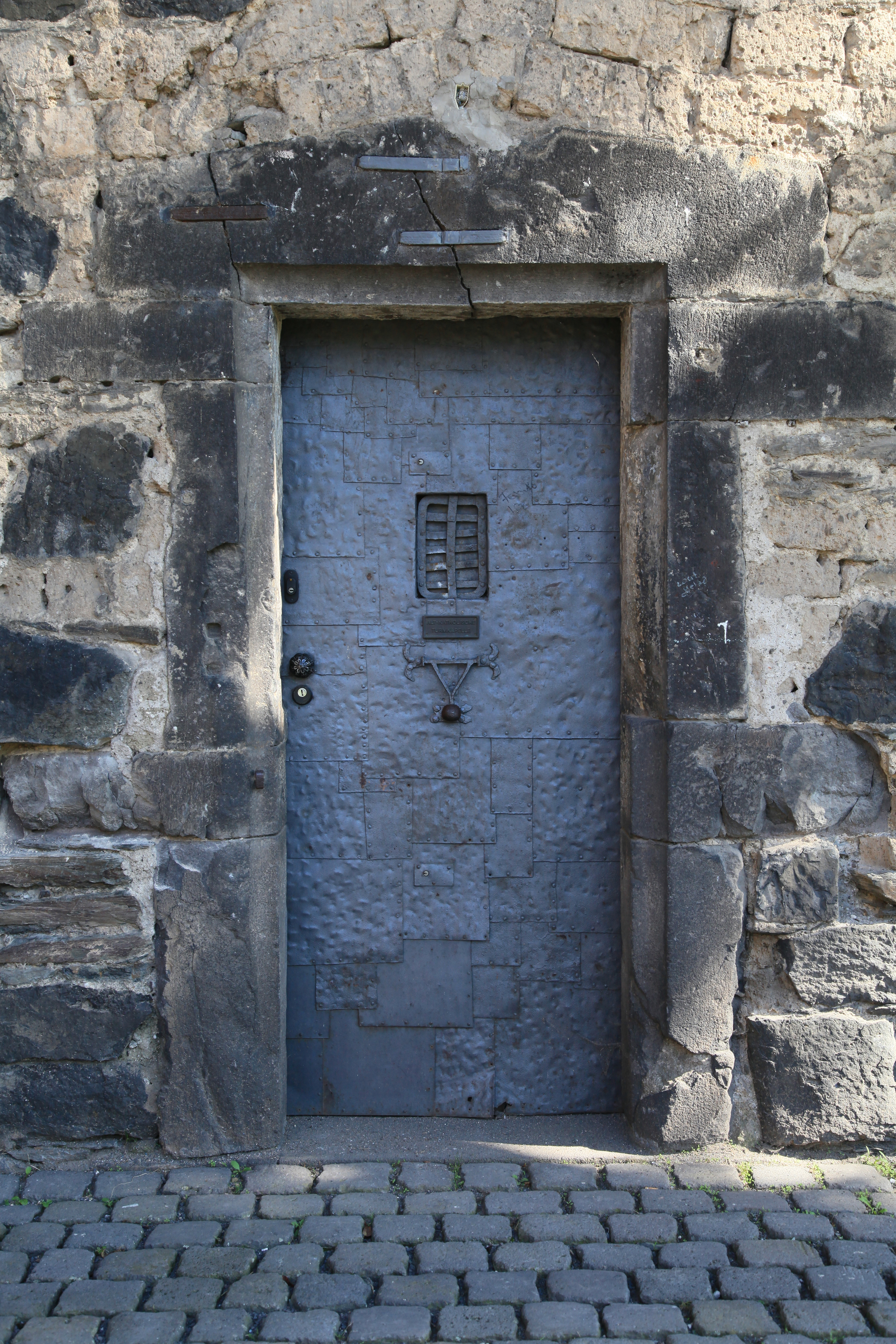 Stadtburg, Am Stadtgraben in Andernach